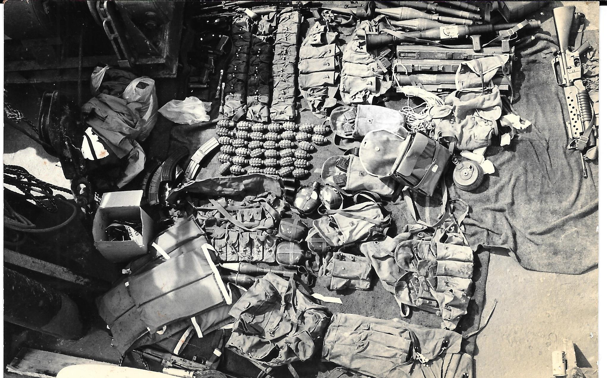 נשק ותחמושת שנמצאו באוניית המחבלים סטפני שנעצרה על ידי ספינות חיל הים